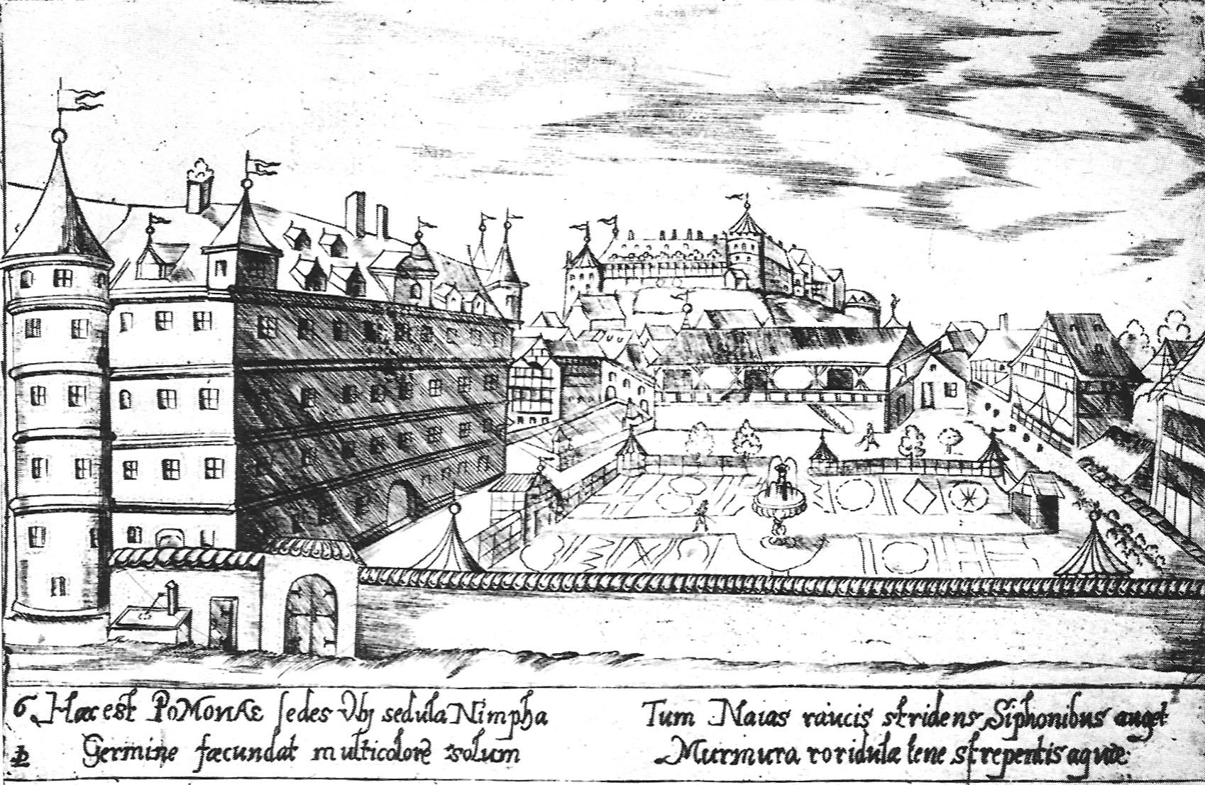 Collegium Illustre. Das Gebäude mit Garten und Blick auf das Schloss Hohentübingen (Radierung)